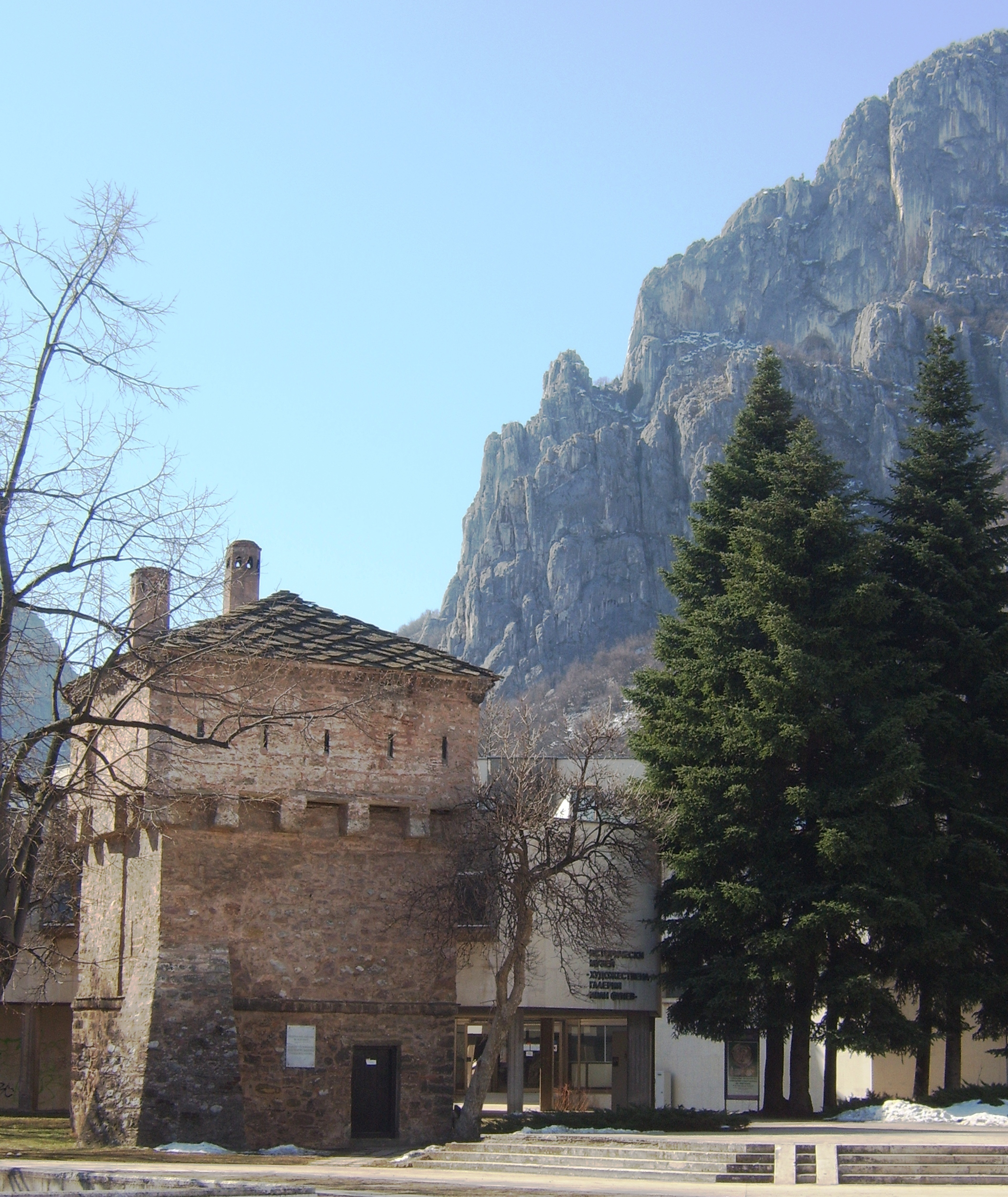 Курпашовата кула в центъра на Враца